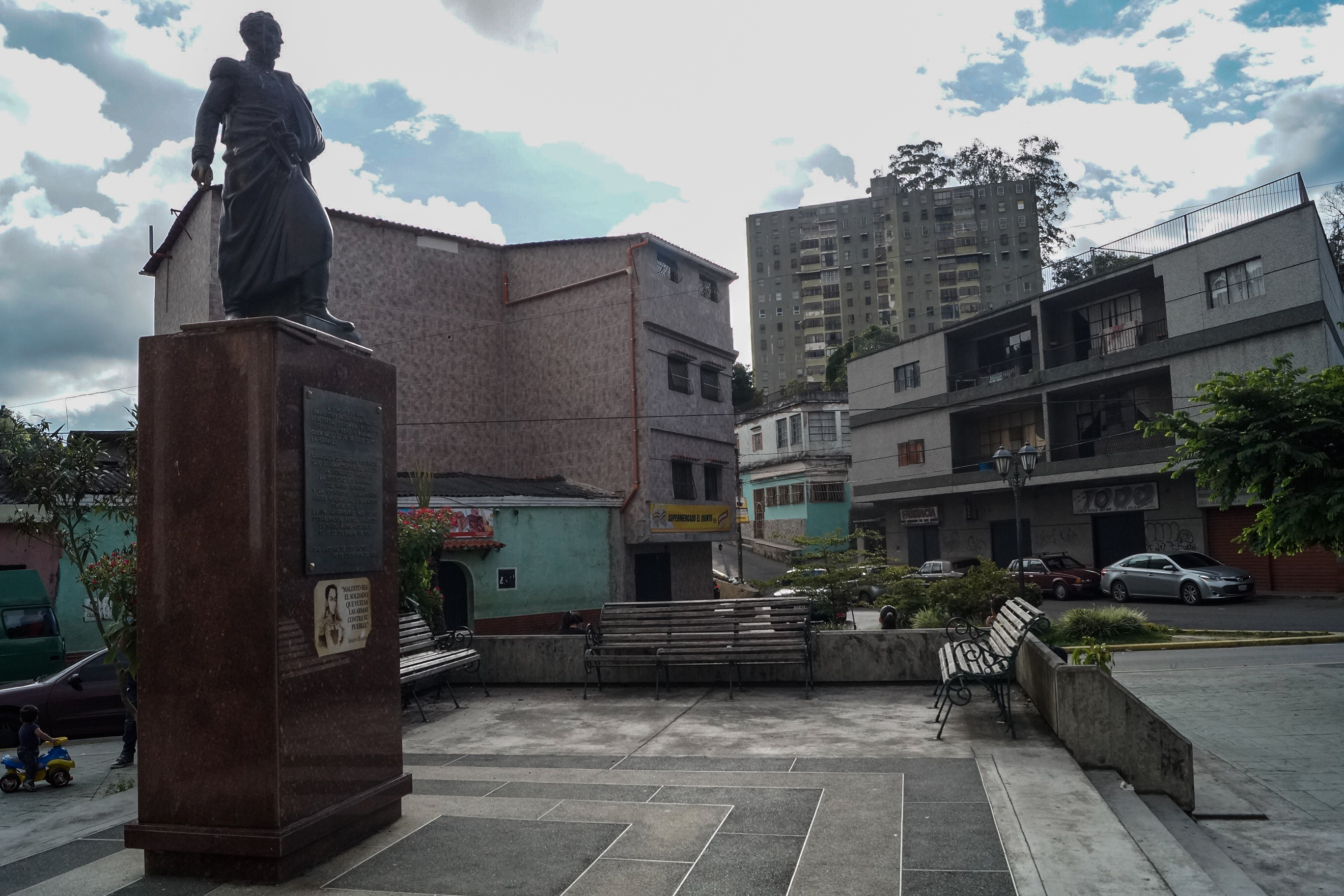 Plaza Bolívar (San Antonio de Los Altos)